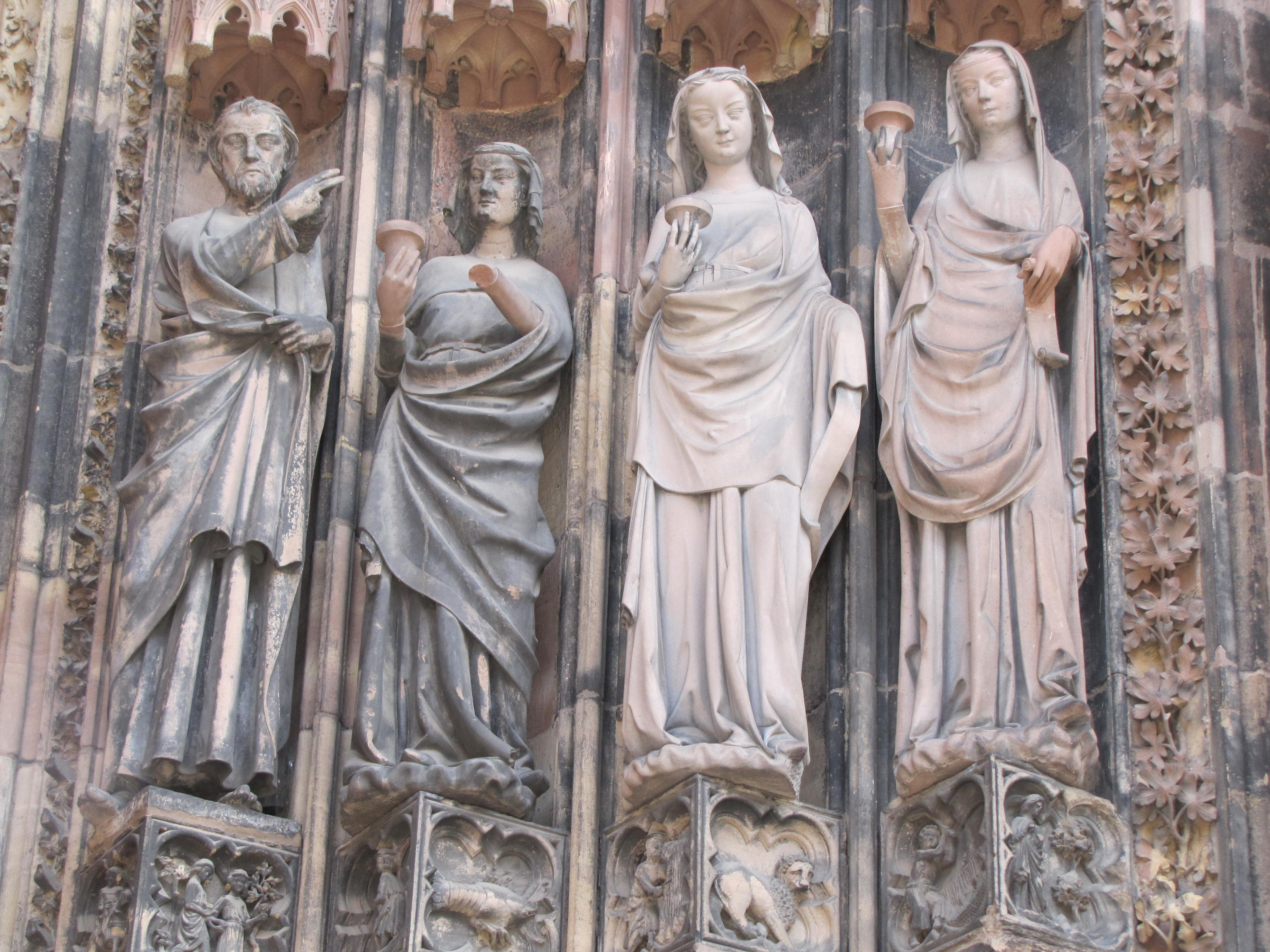 Alsace, Bas-Rhin, Cathédrale Notre-Dame de Strasbourg (PA00085015).Façade occidentale, Portail secondaire "Vierges sages" (lampe vers le haut)